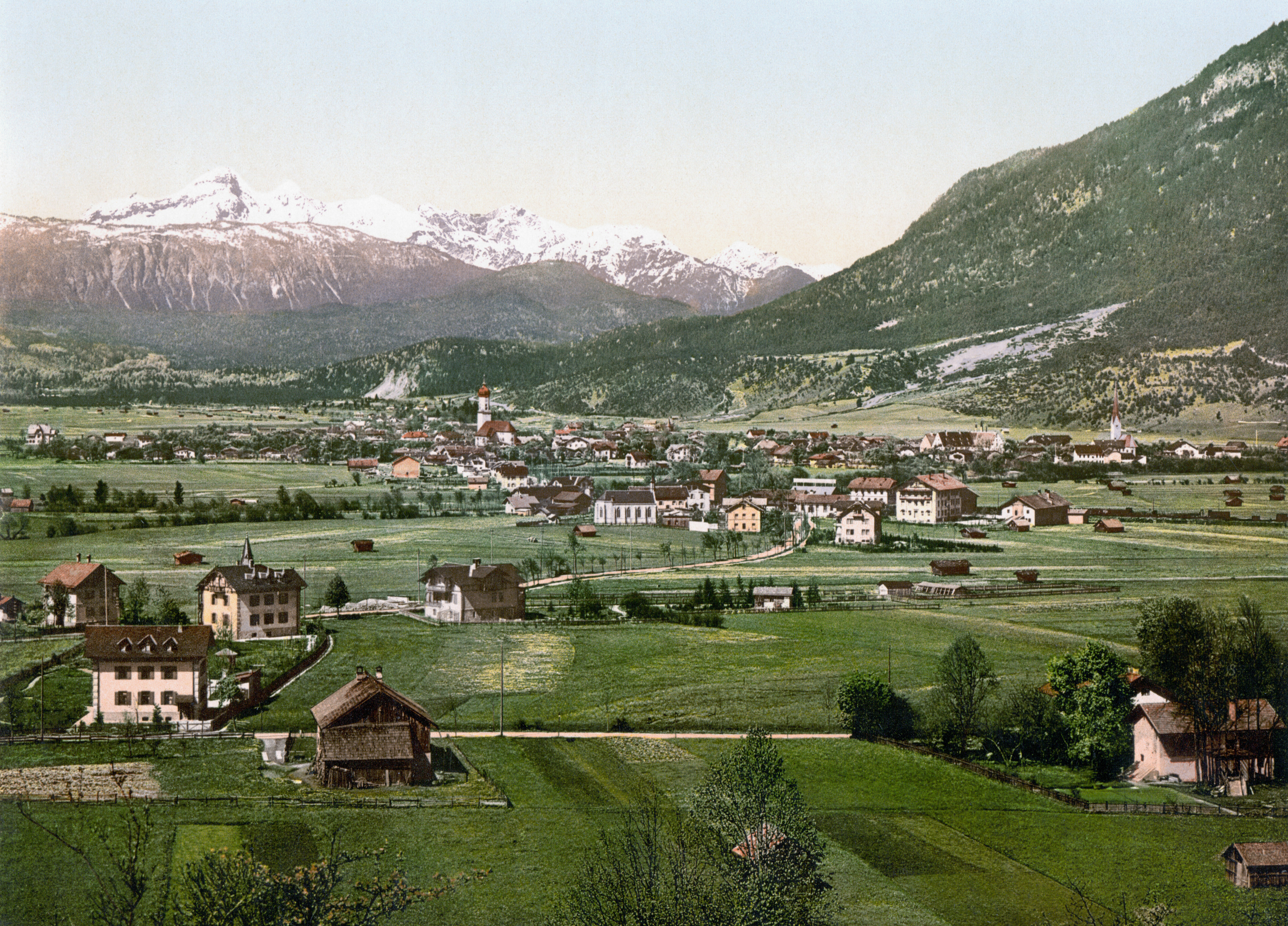 Garmisch